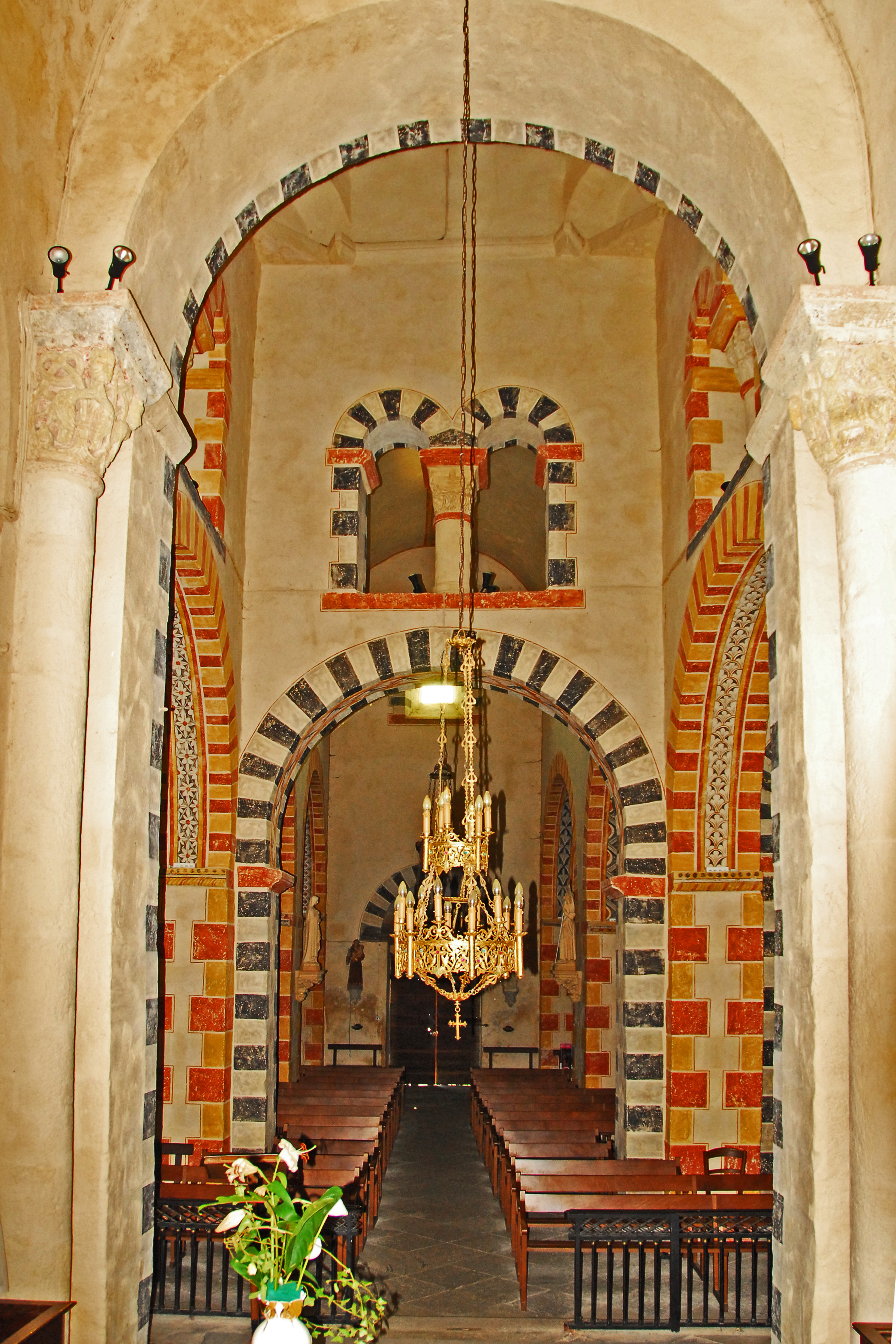 St.-Jean Glaine-Montaigut, Vierung aus Chorjoch